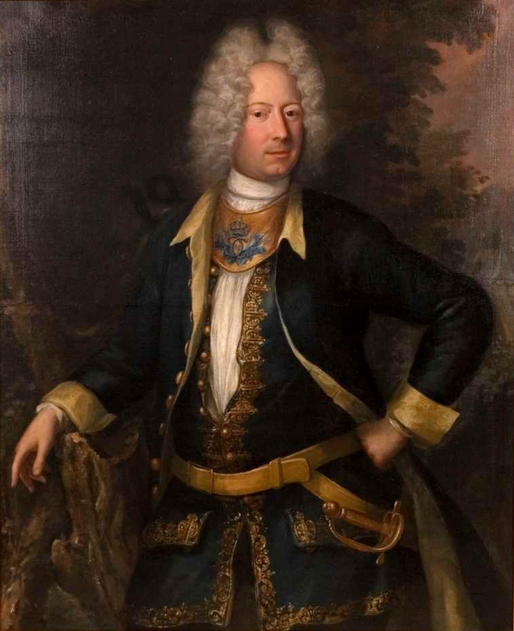 Porträtt av Johan David Schwartz föreställande Arvid Bernhard Horn, chef för Livdrabanterna.